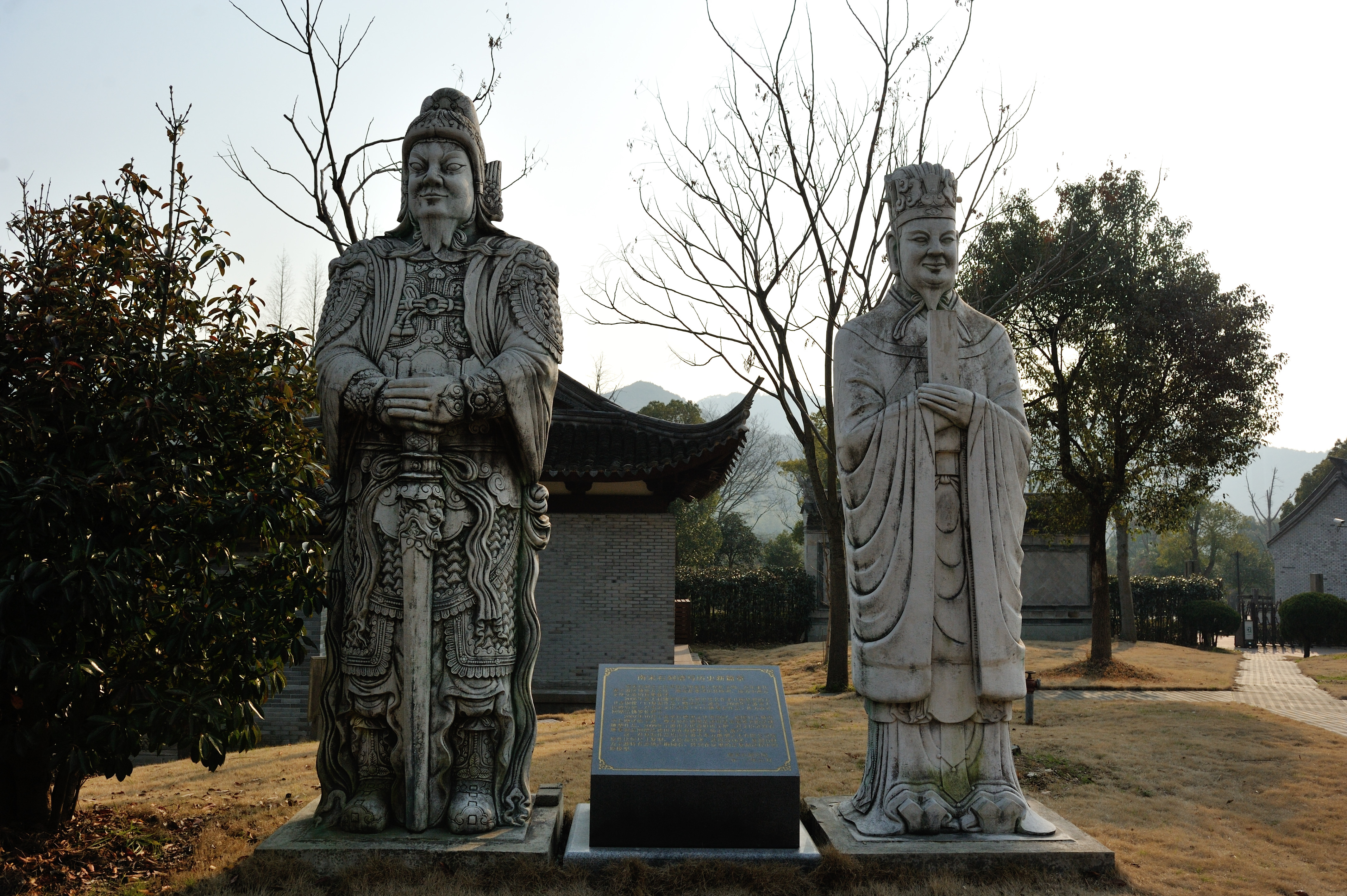 宁波南宋石刻公园